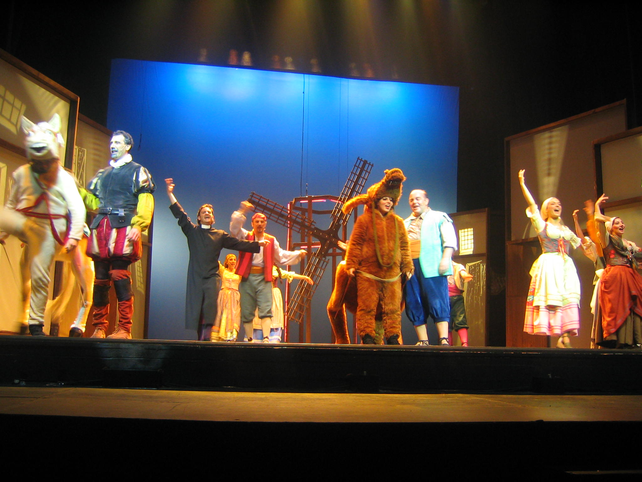 Ensayos 021